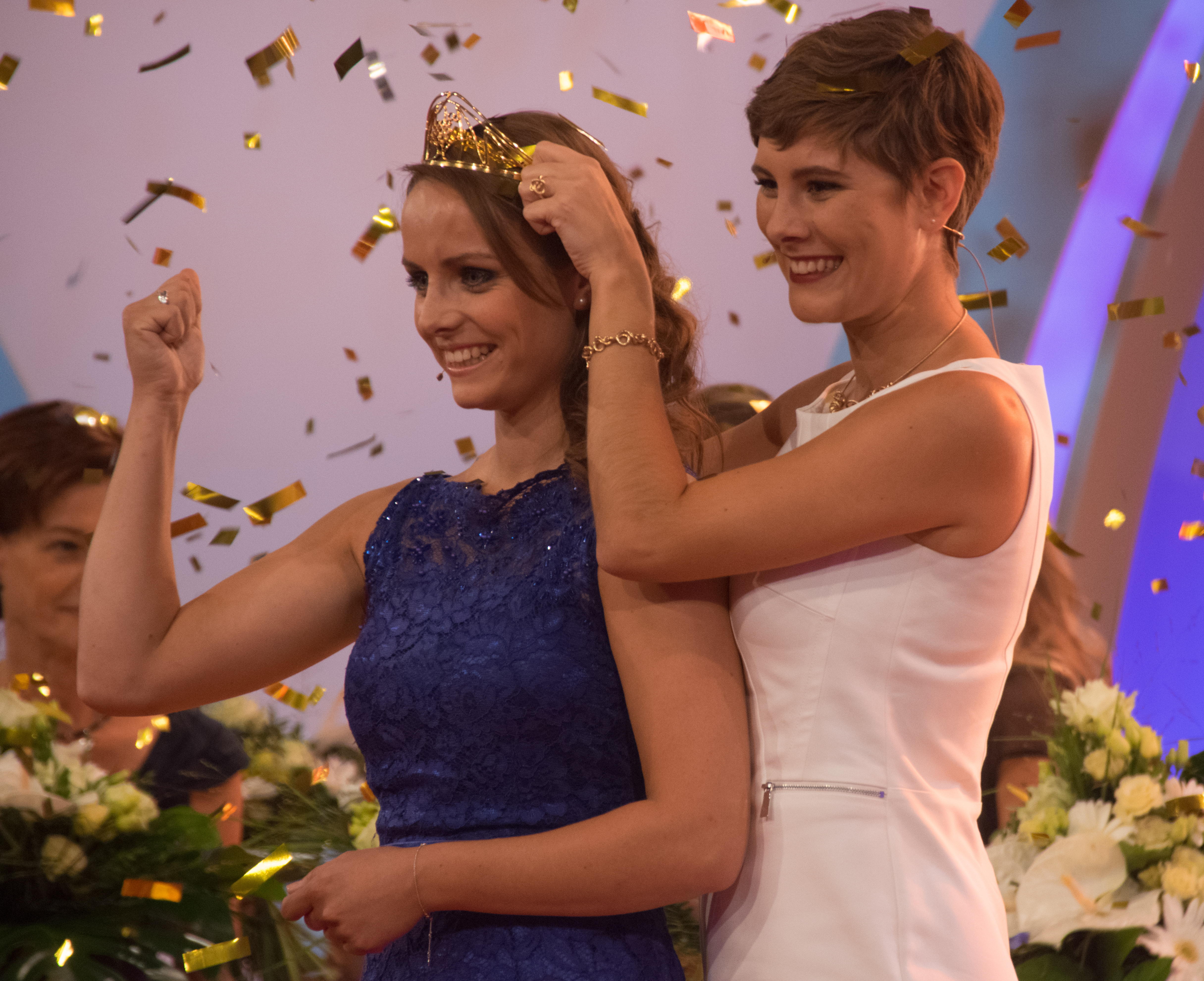 Wahl zur 68. Deutschen Weinkönigin am 30. September 2016 in Mainz, Rheingoldhalle